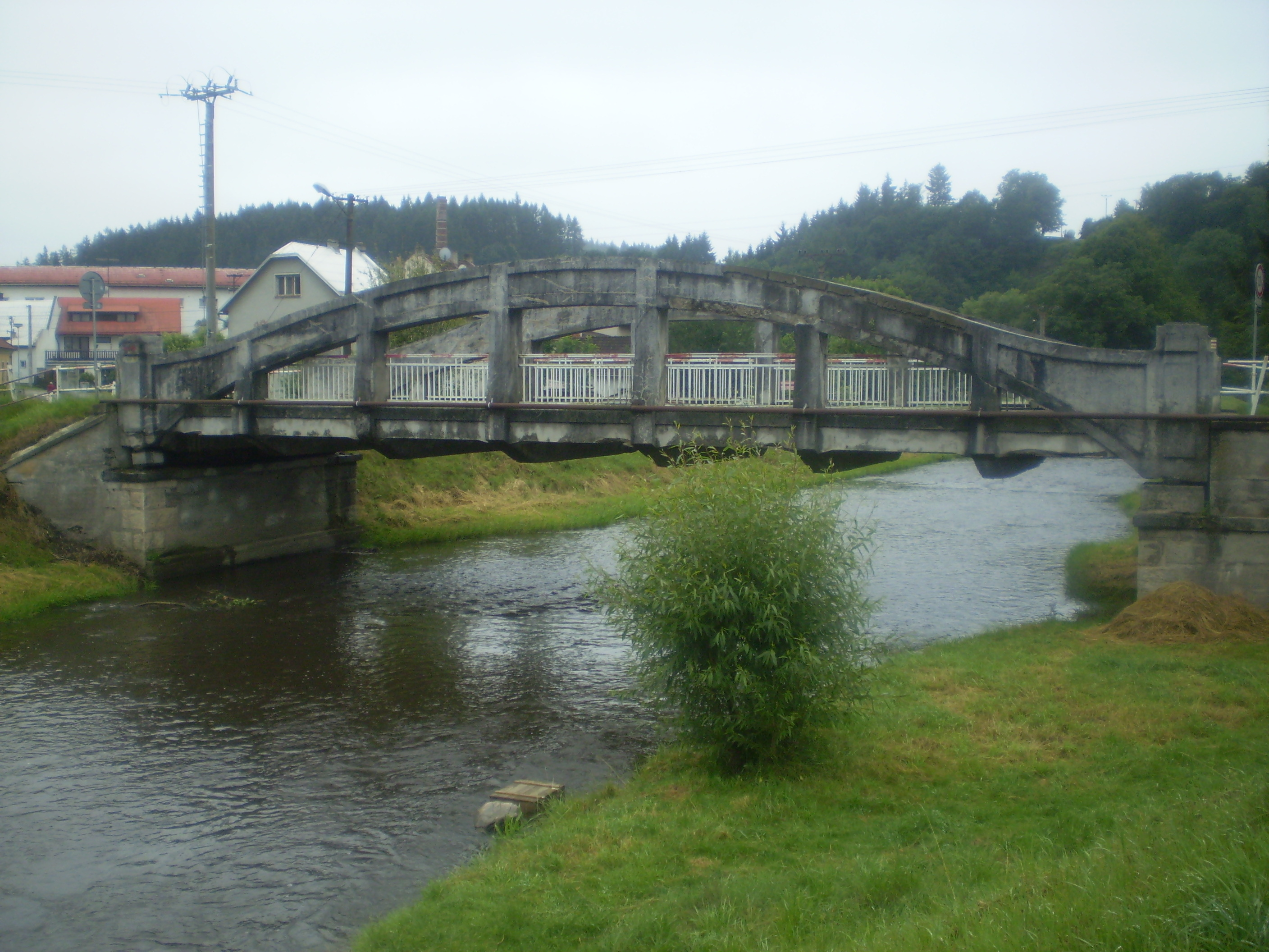 Benátský most v Jimramově